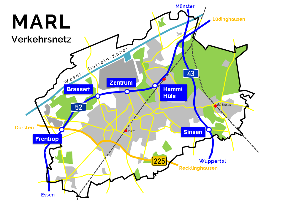 Verkehrsnetzkarte - Stadt Marl, Nordrhein-Westfalen, Deutschland